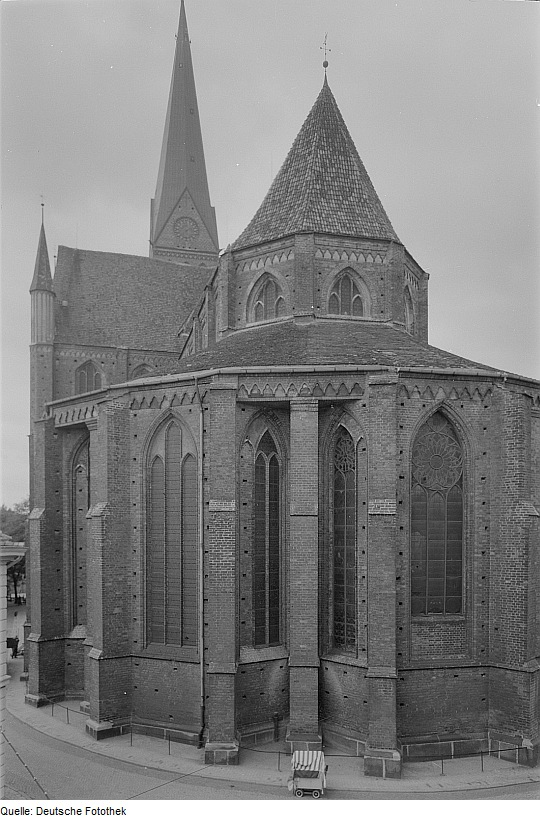 Original image description from the Deutsche Fotothek Schwerin. Dom (um 1270 begonnen), Chor, Ansicht von Ostsüdost